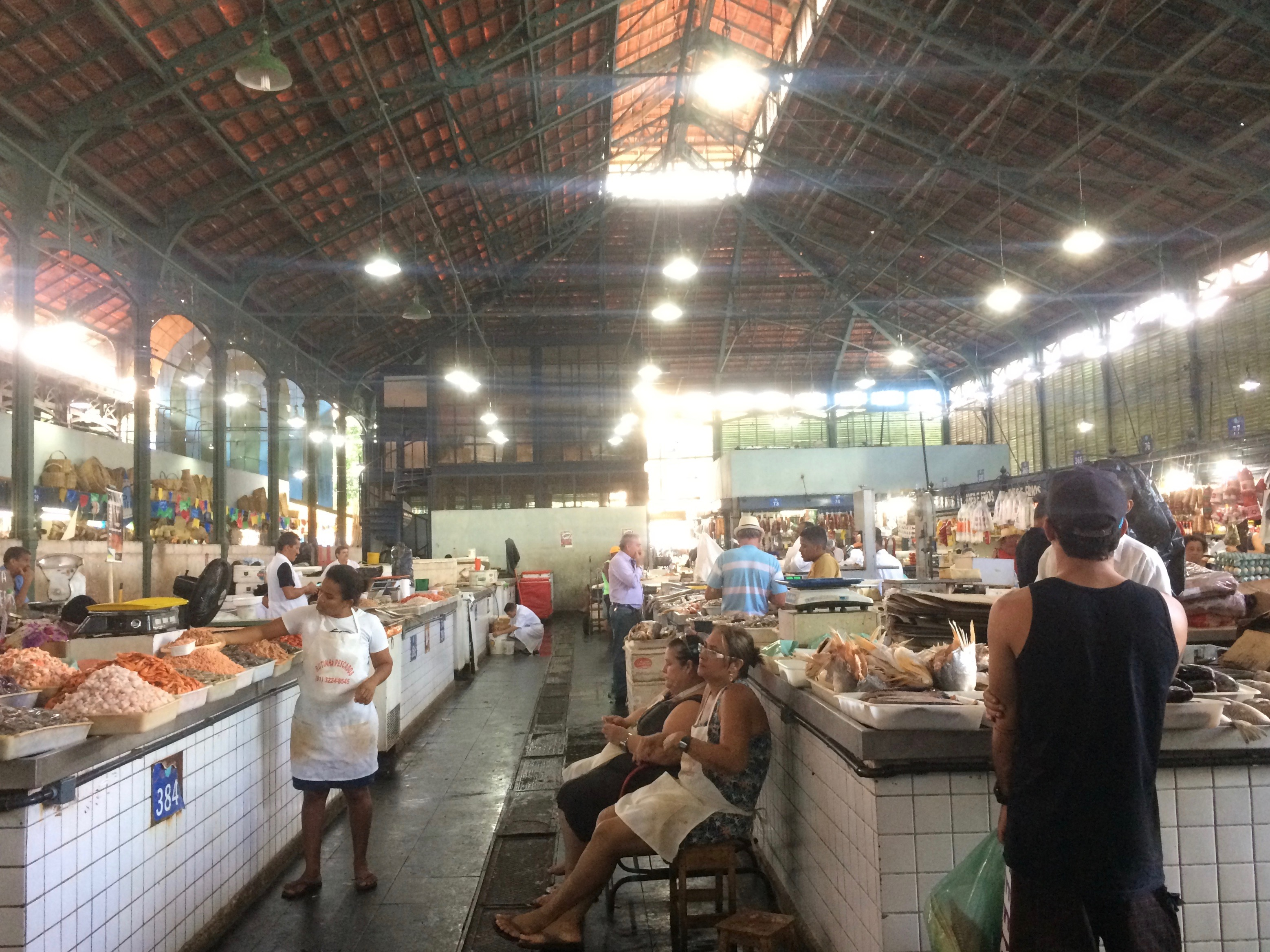 Mercado de São José